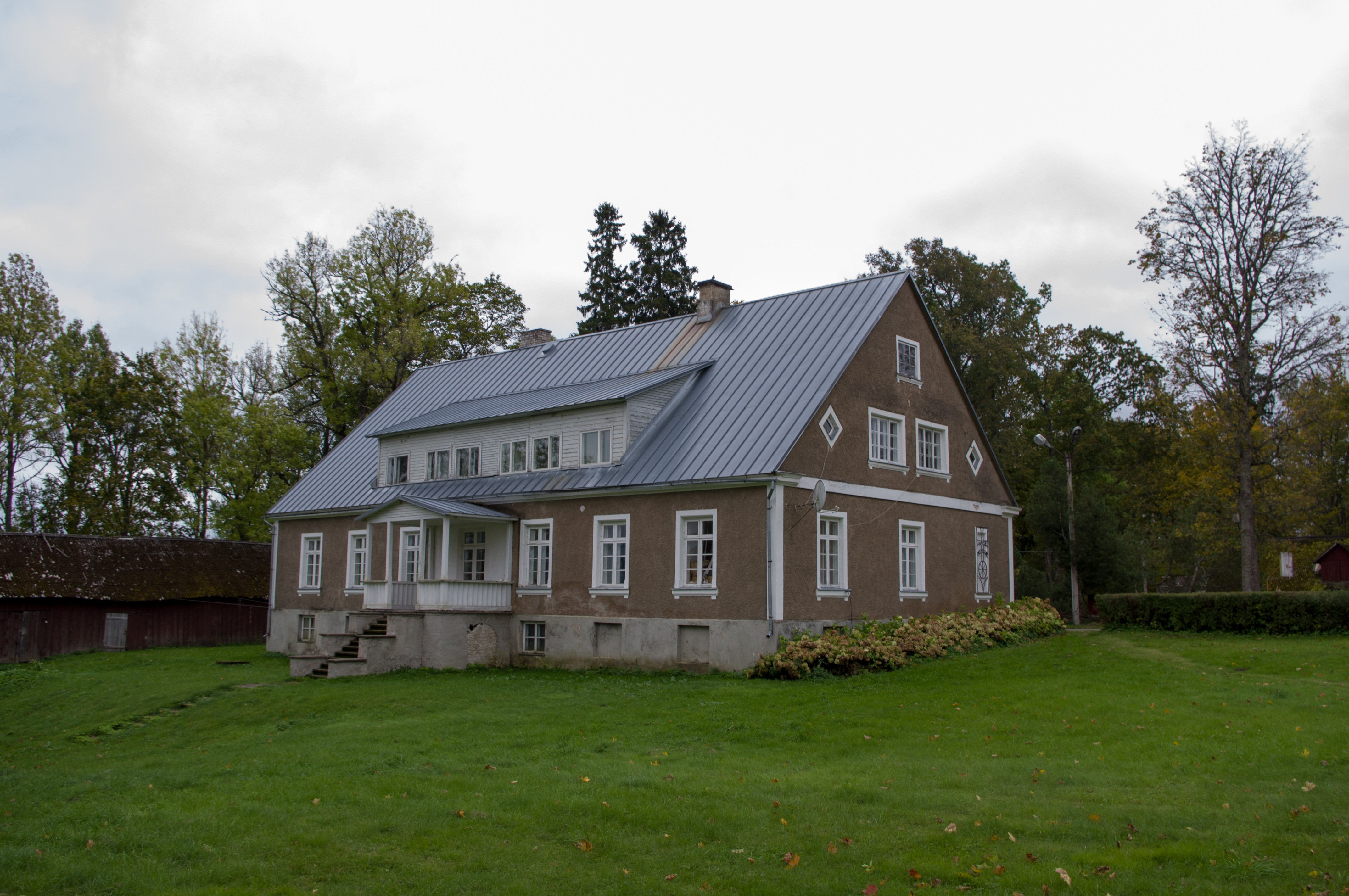 Saarde pastoraadi peahoone